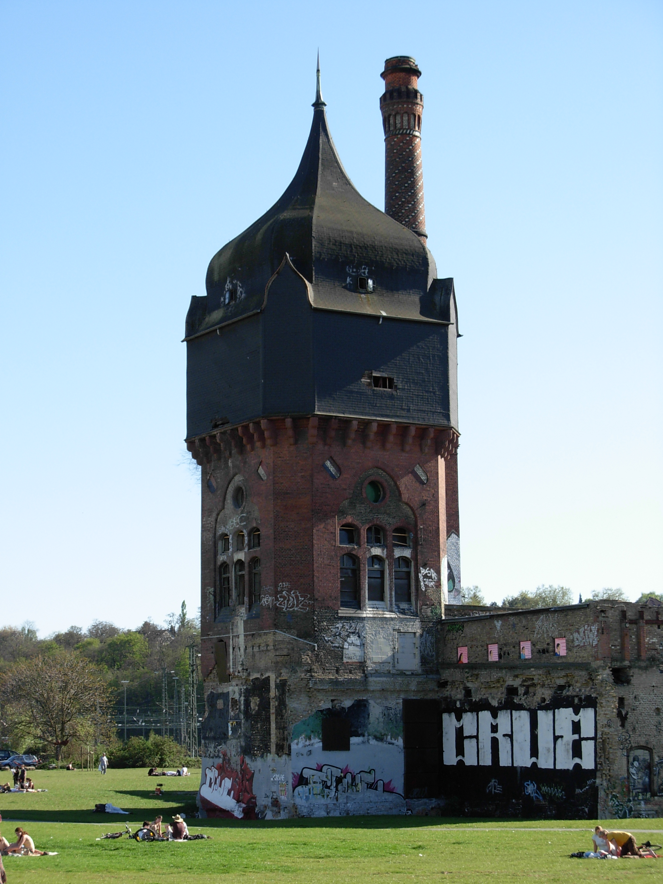 Wasserturm am Hauptbahnhof Wiesbaden